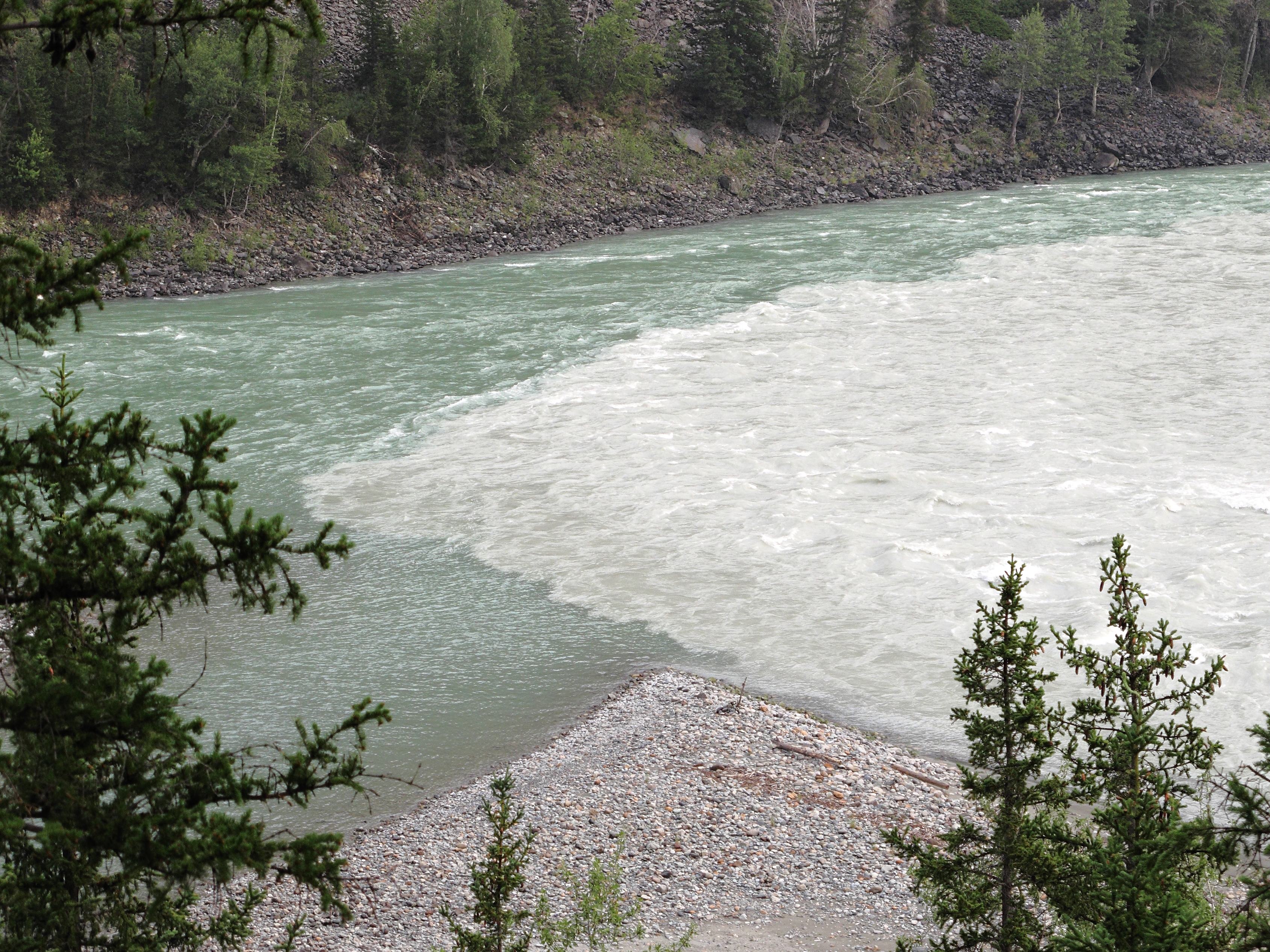 Слияние Аргута и Катуни, Усть-Коксинский район, Республика Алтай